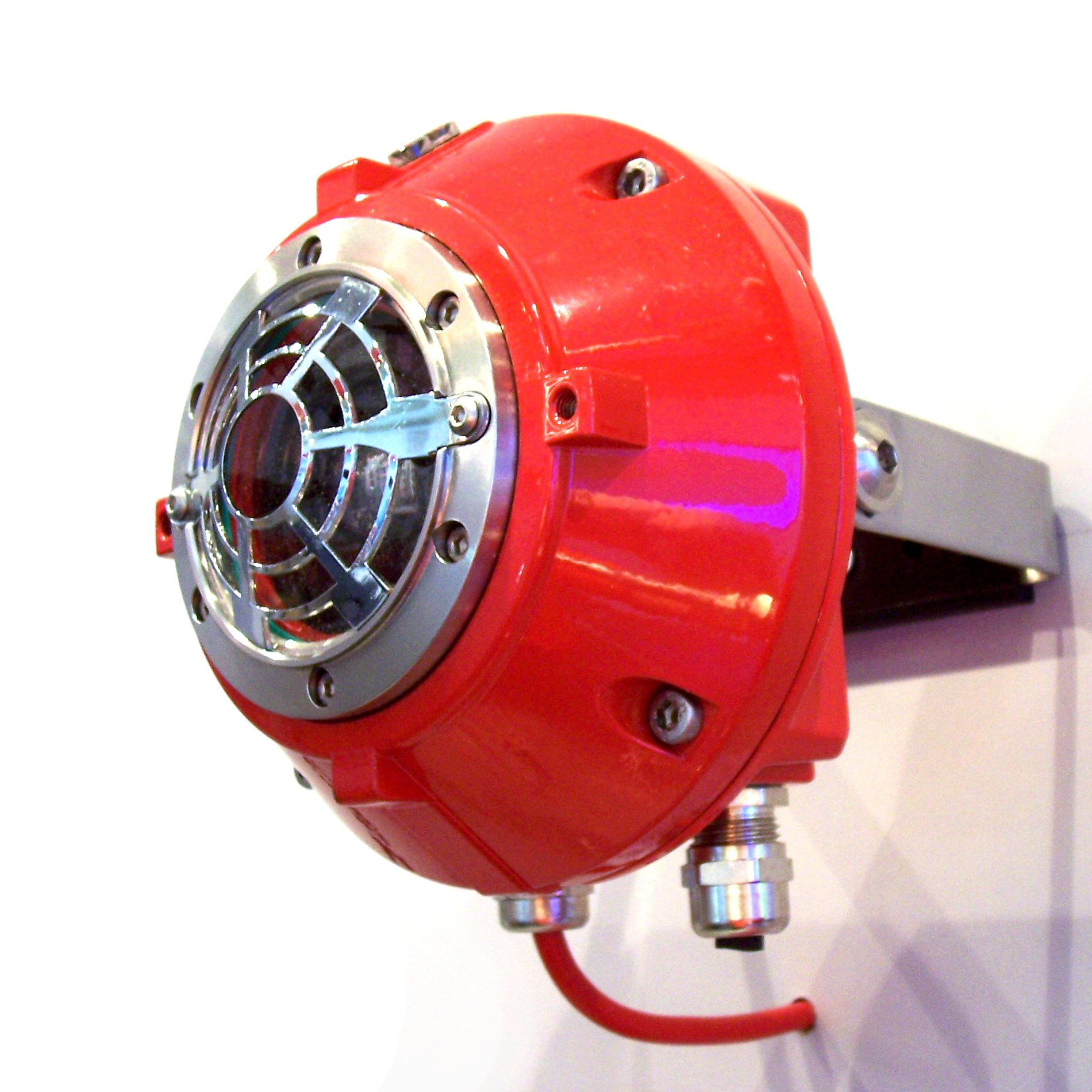 UV flame detector for rough industrial use / UV Flammenmelder für rauhen Industrieeinsatz